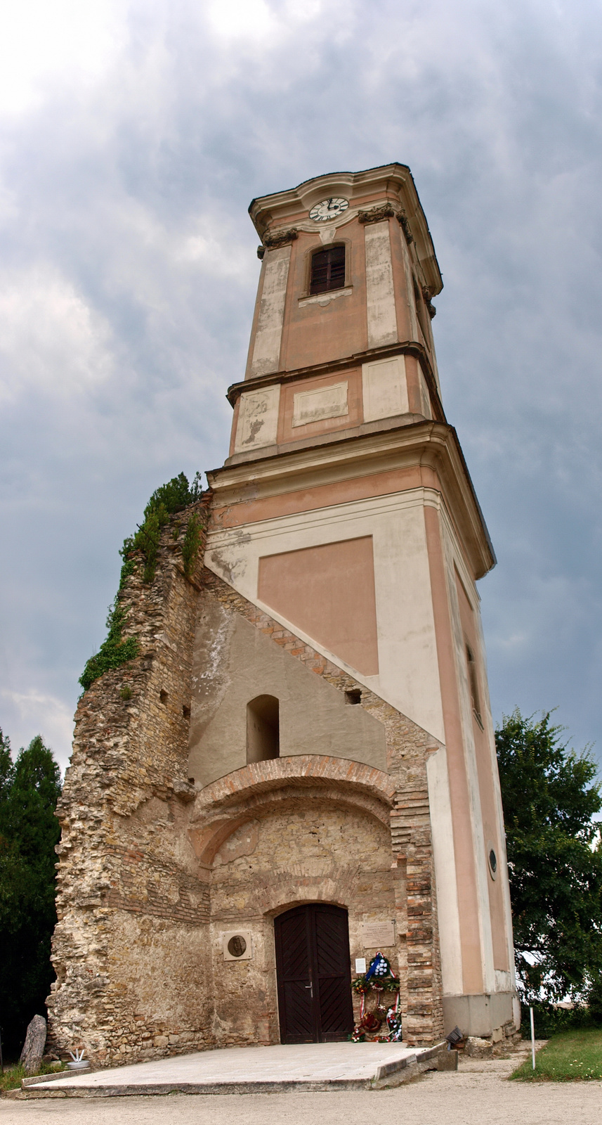 templom megmaradt tornya (Oroszlány, Majkpuszta) This is a photo of a monument in Hungary. Identifier: 11935